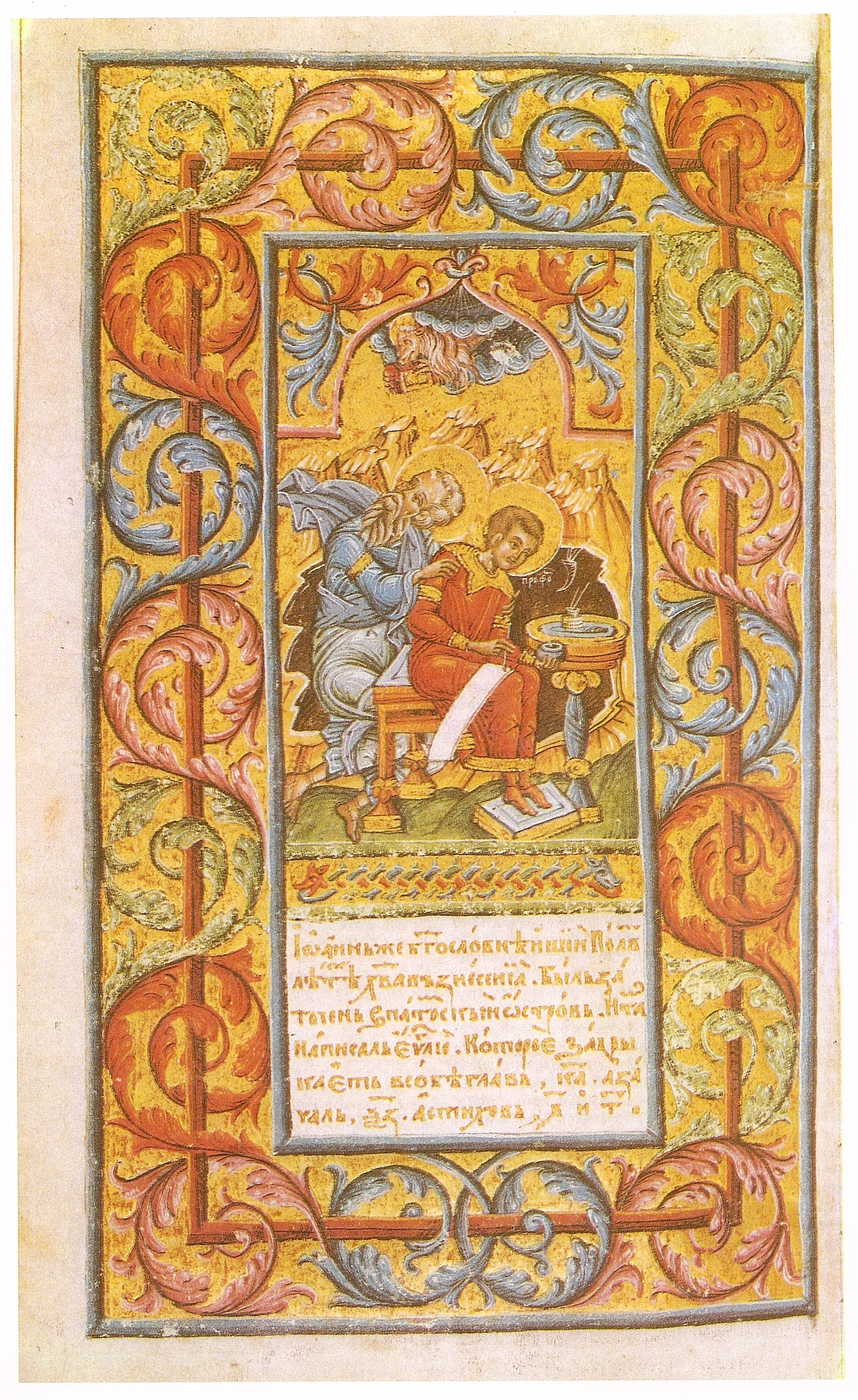 Мініатюра.